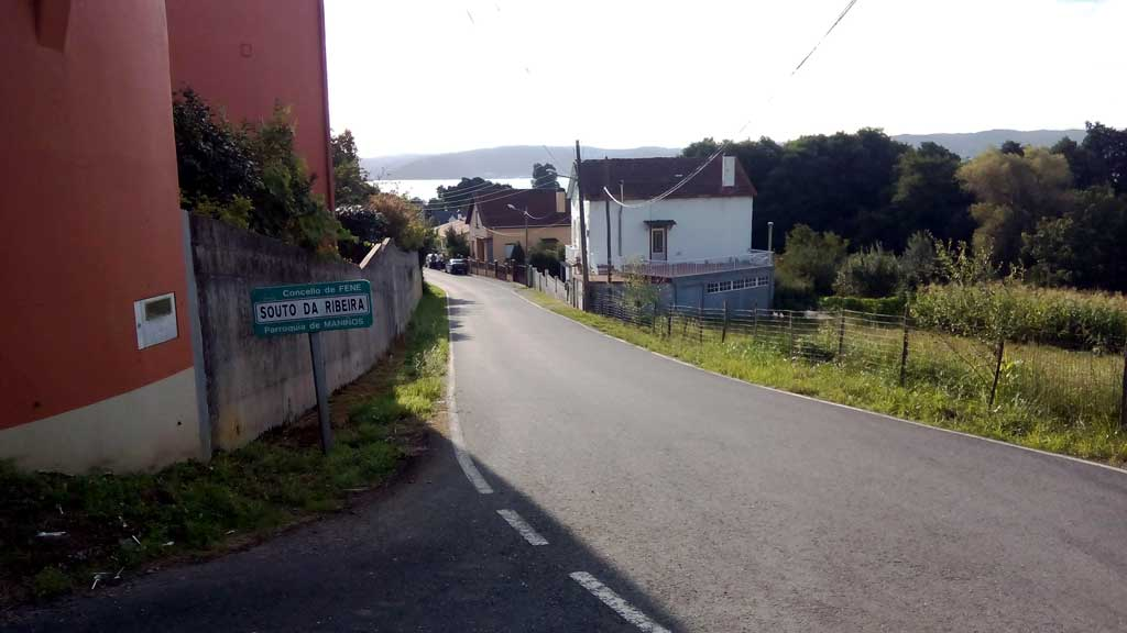 Vista de Souto da Ribeira, Fene.